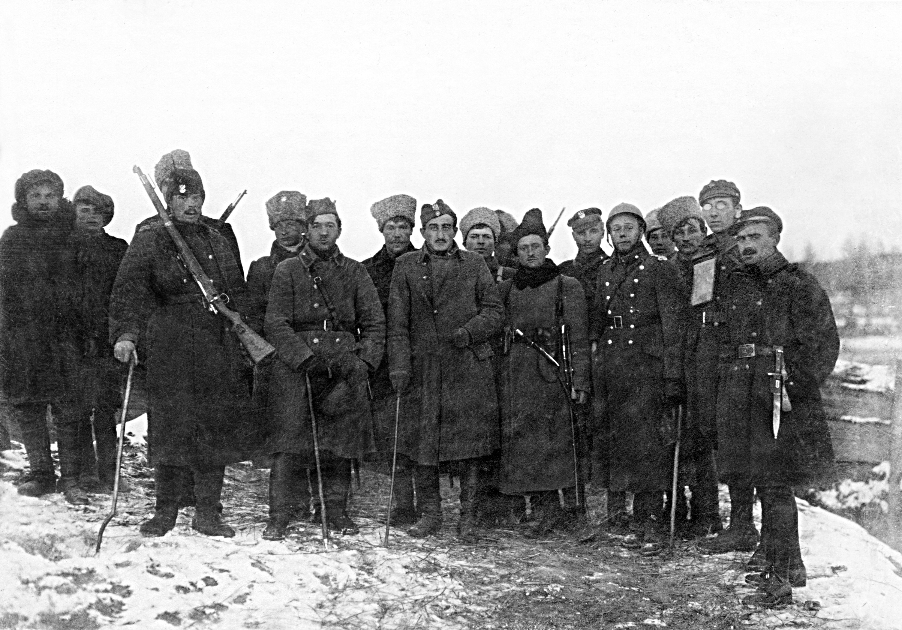 Повстанцы атамана Лукаша Семенюка с польскими военными. Великое Стахово, 1919 г.